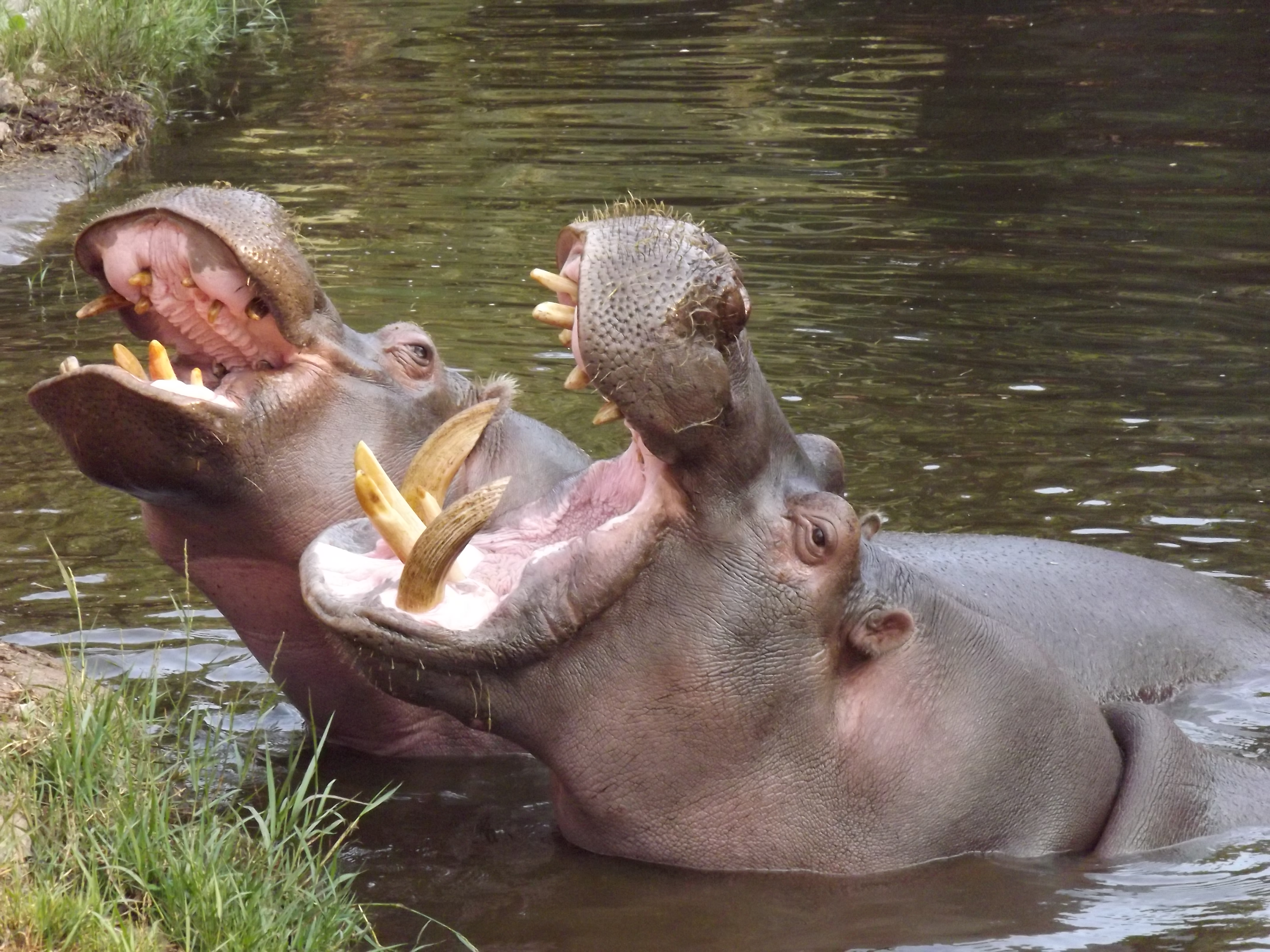 فرس النهر في حديقة حيوان النزهة - الاسكندرية